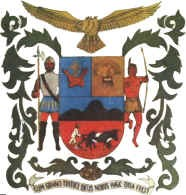 Escudo Municipio Rivas Davila - Merida - Venezuela